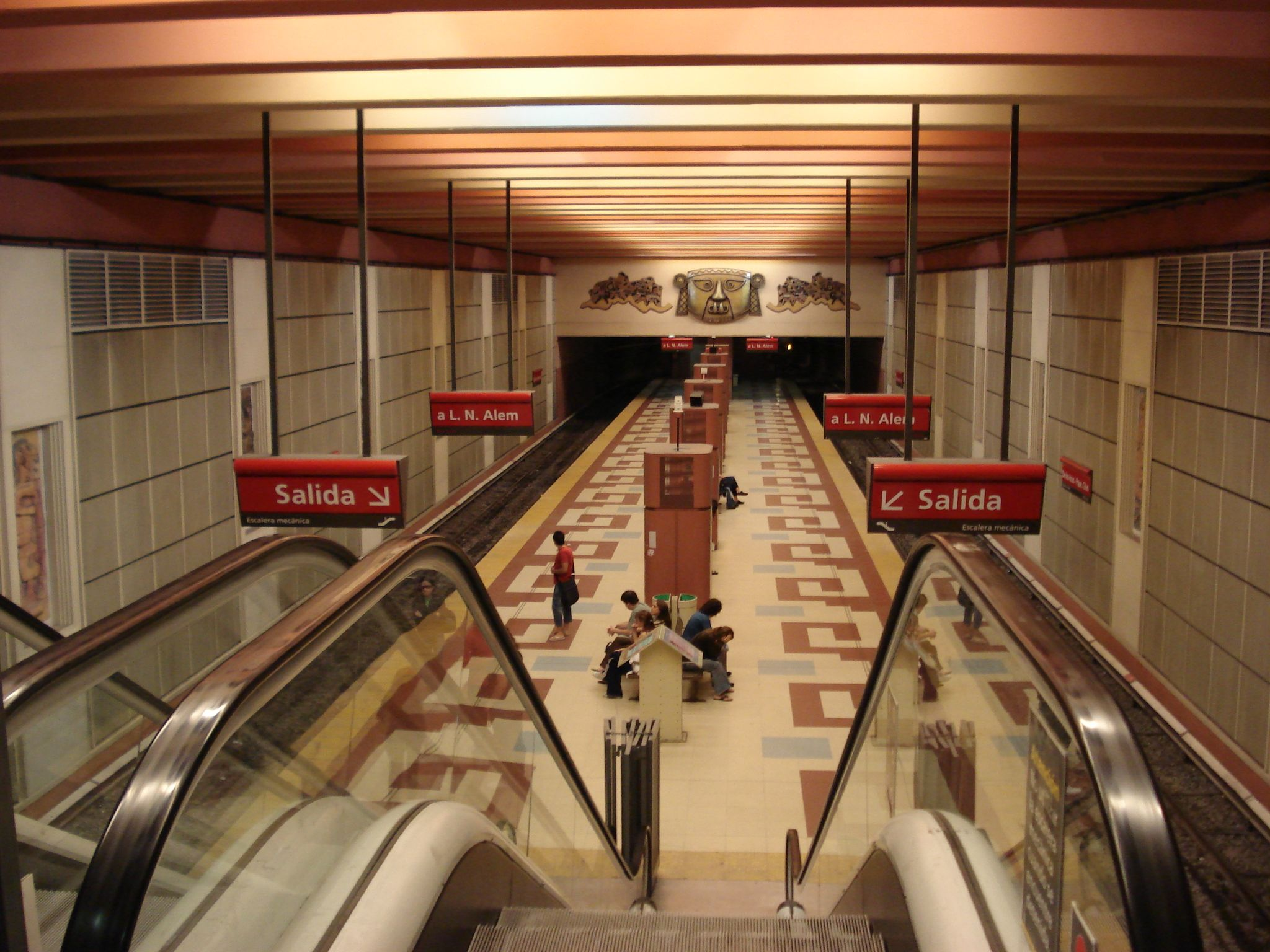 Estación Los Incas de la Linea B del subterraneo de Buenos Aires